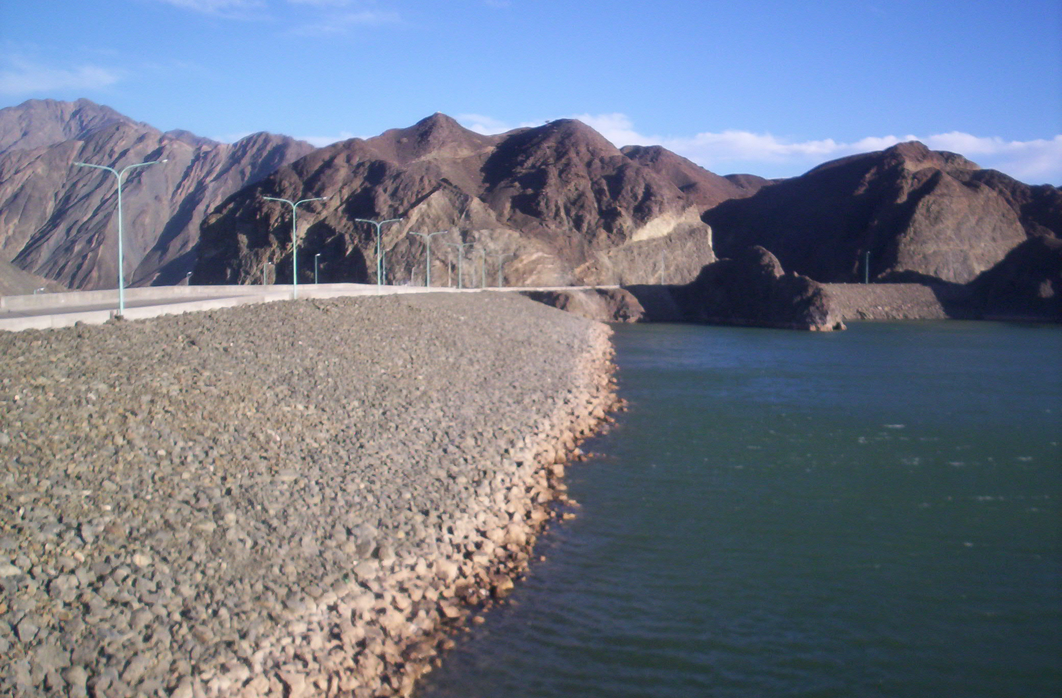 Vista del Dique Cuesta del Viento, ubicado en el departamento Iglesia, al norte del parovincia argentina de San Juan